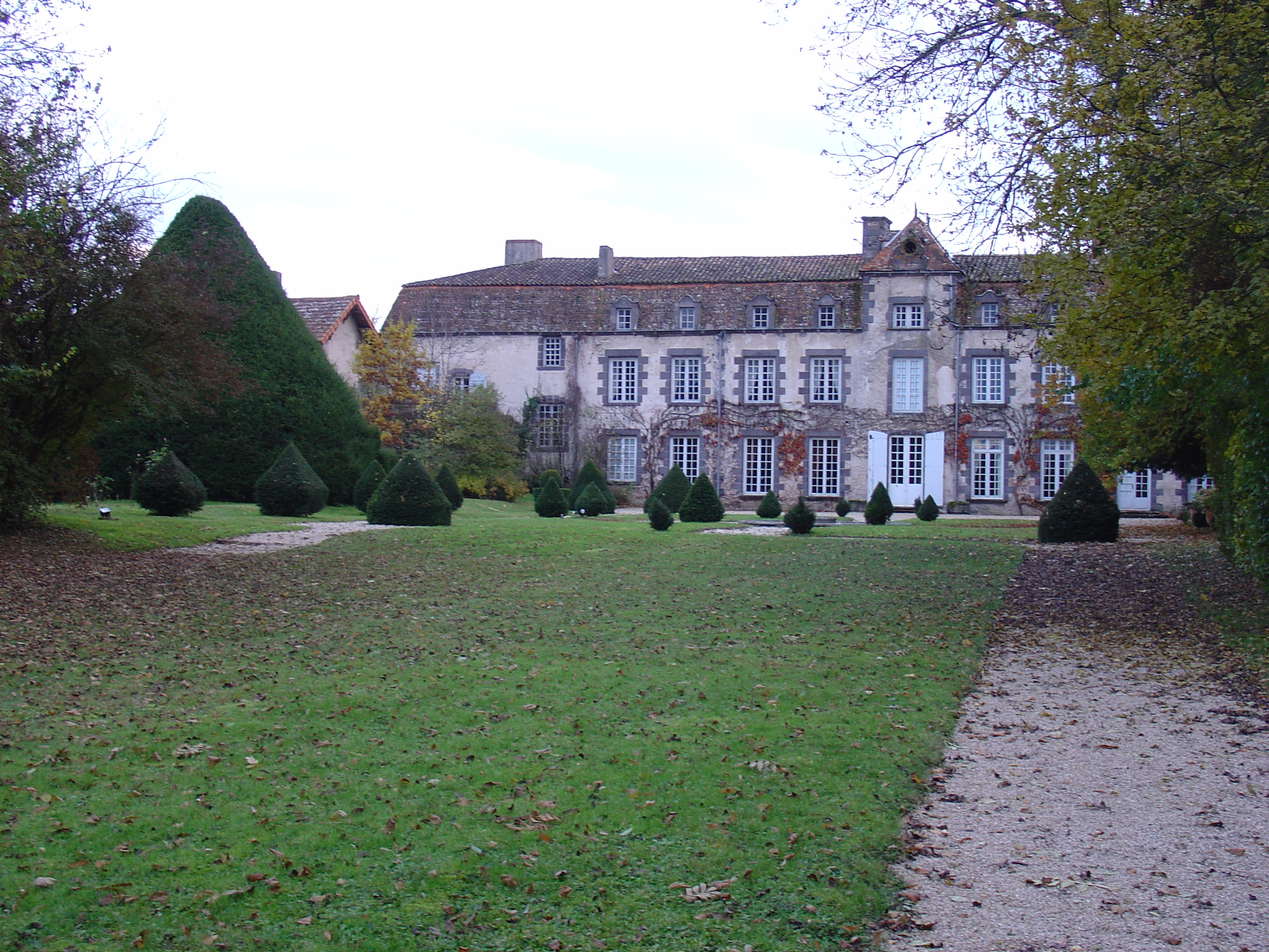 Château de Davayat côté parc.